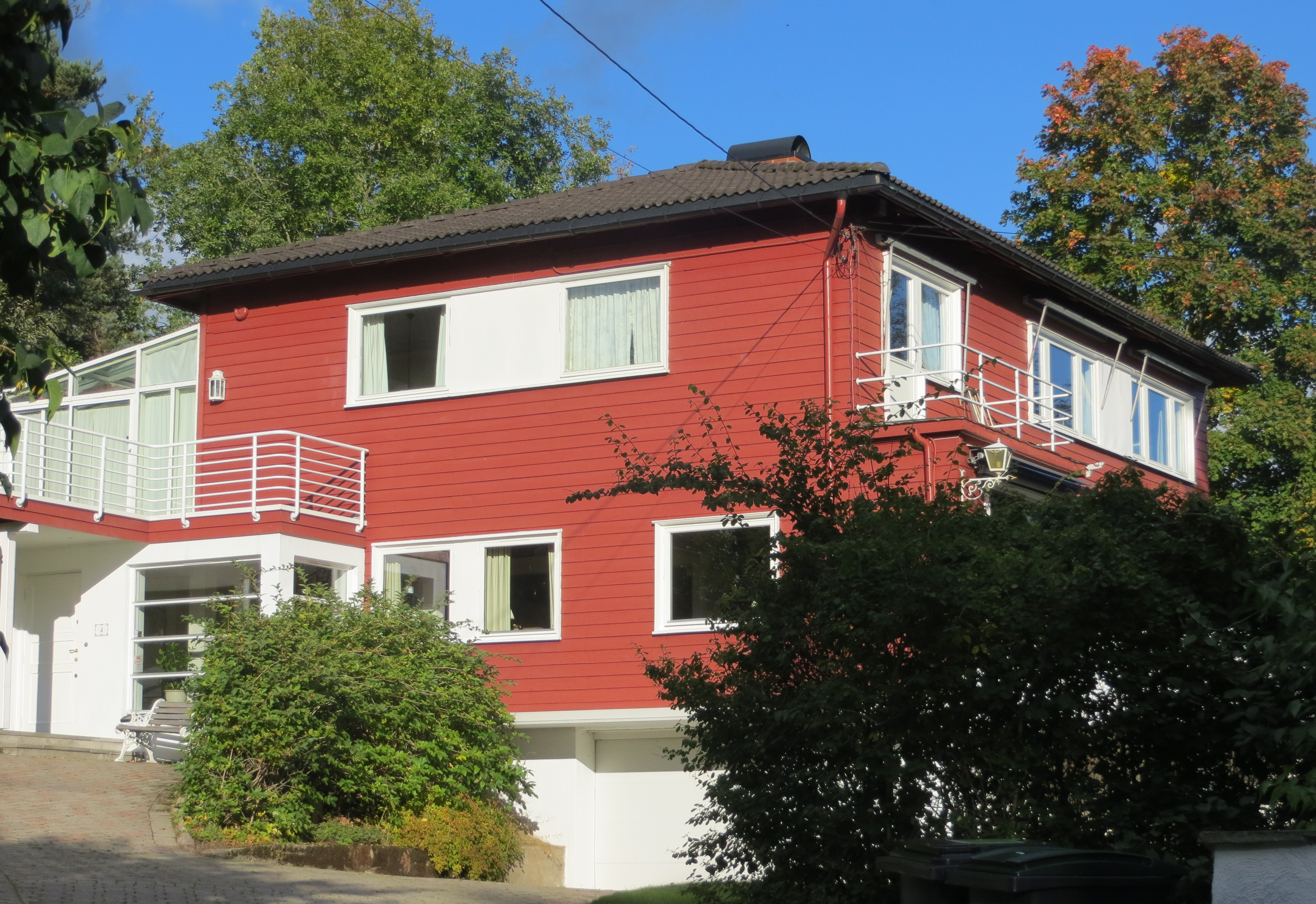 Funkisvilla i Åsbakken i Ullernåsen, bydel Ullern i Oslo. Bygningen er lokalt listeført for bygningsvern.